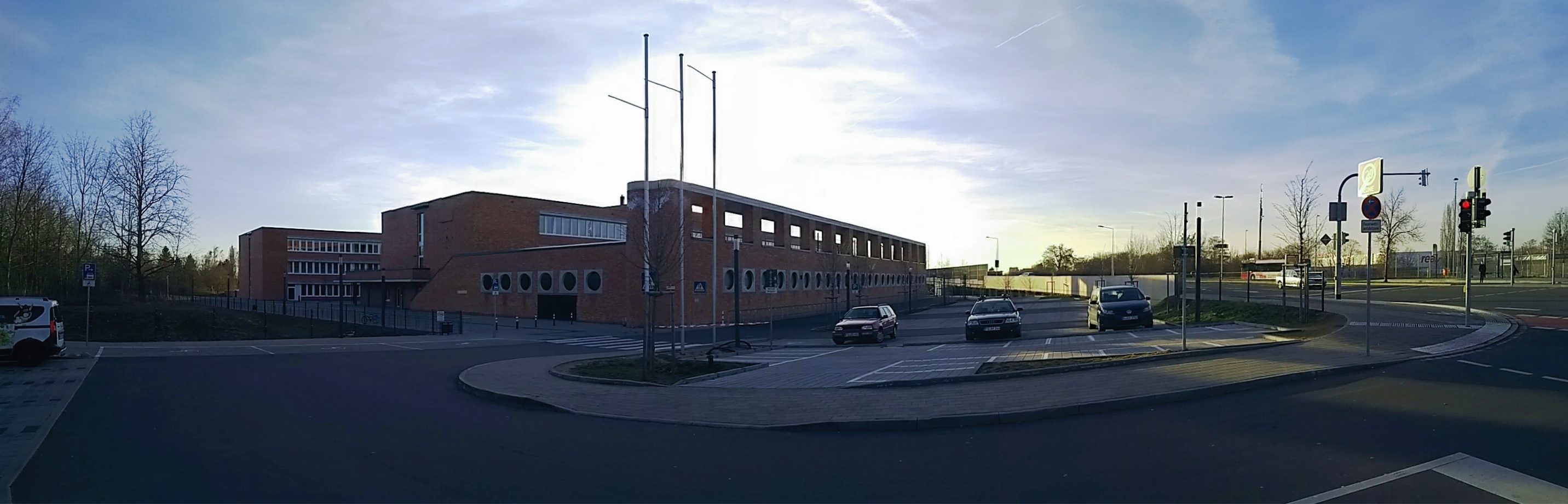 Johann-Pachelber-Realschule in Nürnberg